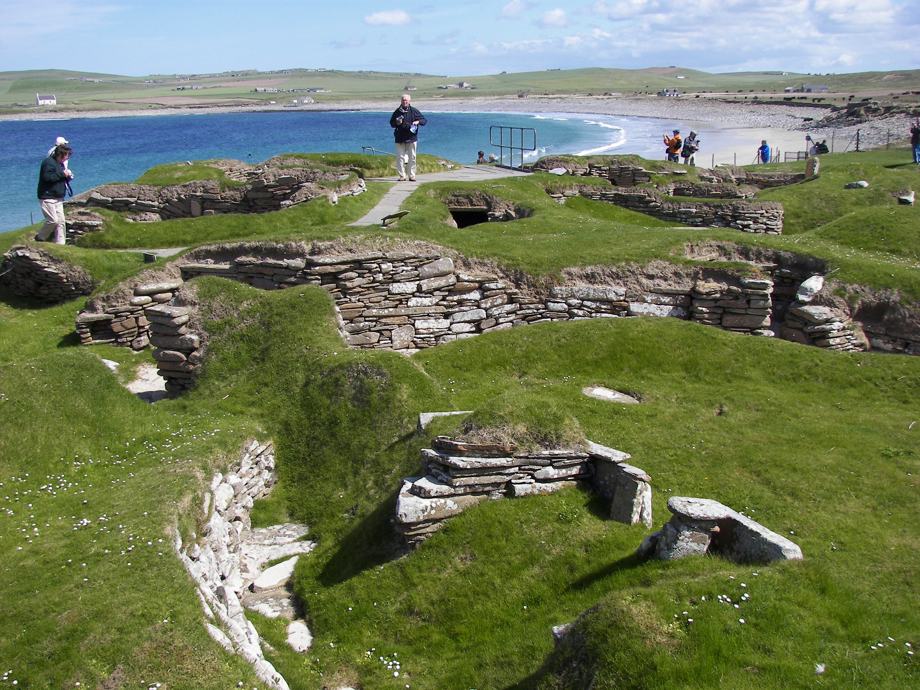 Skara Brae.